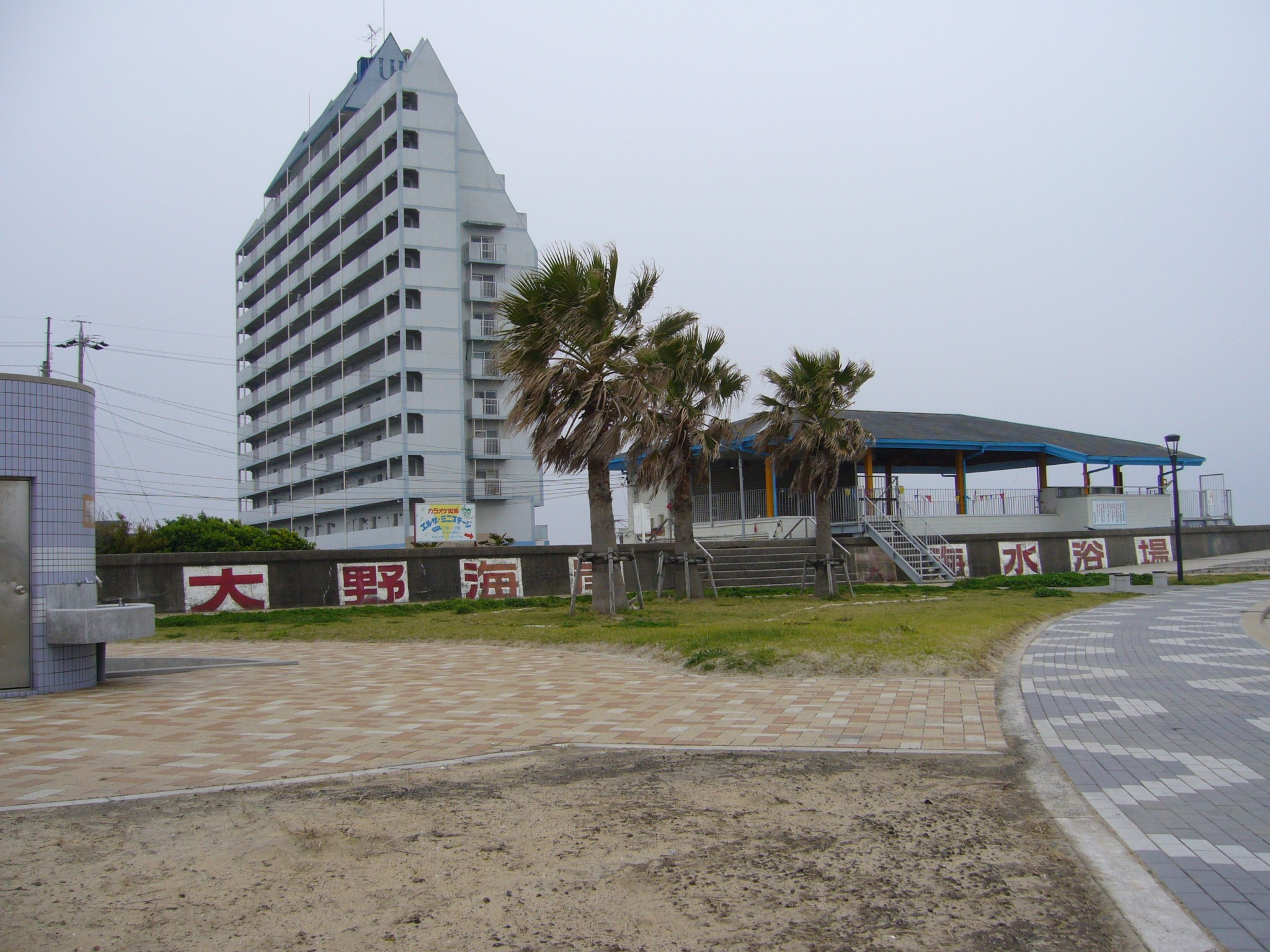 大野海岸海水浴場"日本最古の海水浴場" (愛知県常滑市大野町)